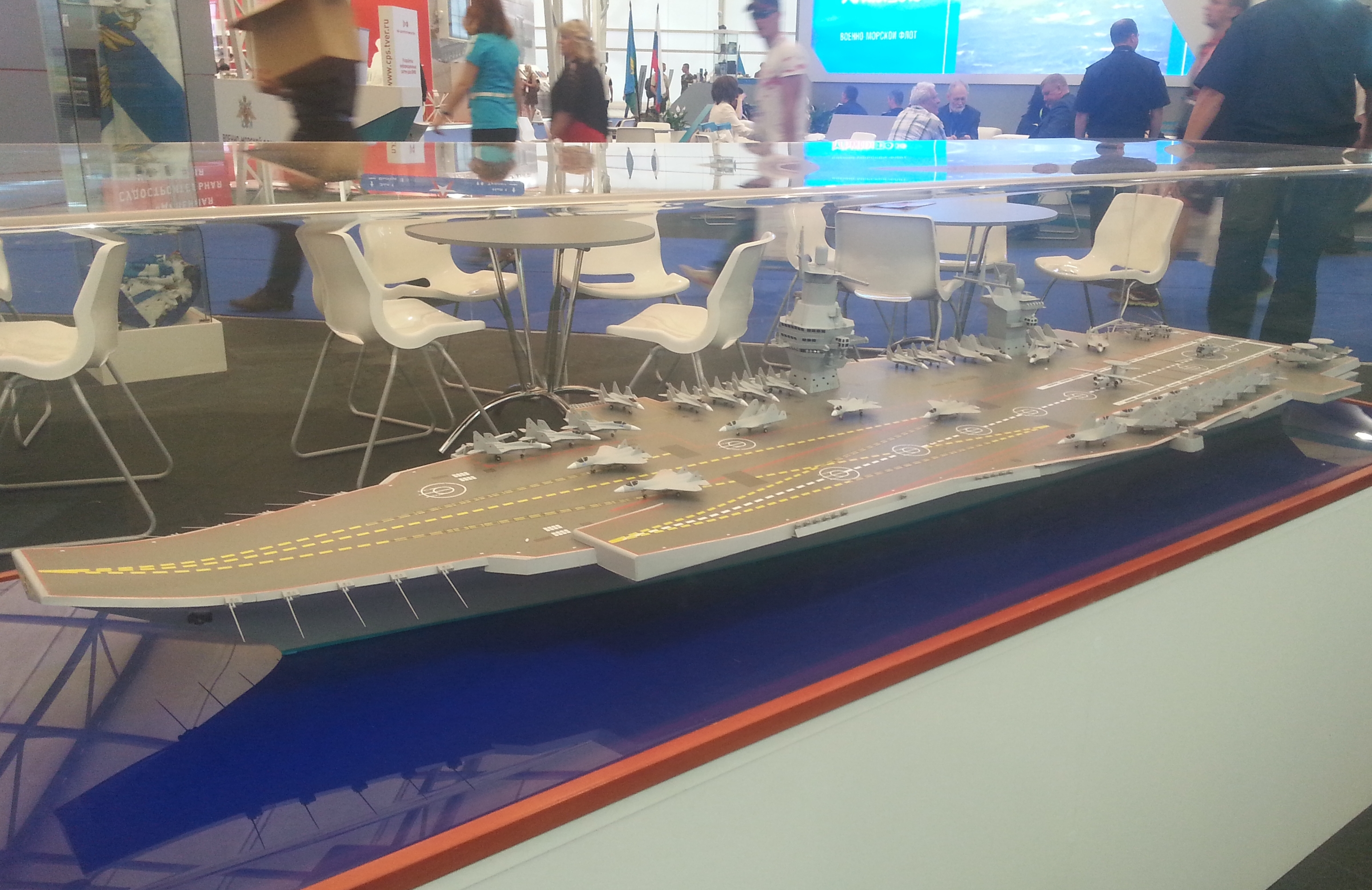 Макет авианосца проекта 23000Е на выставке «Армия 2015»